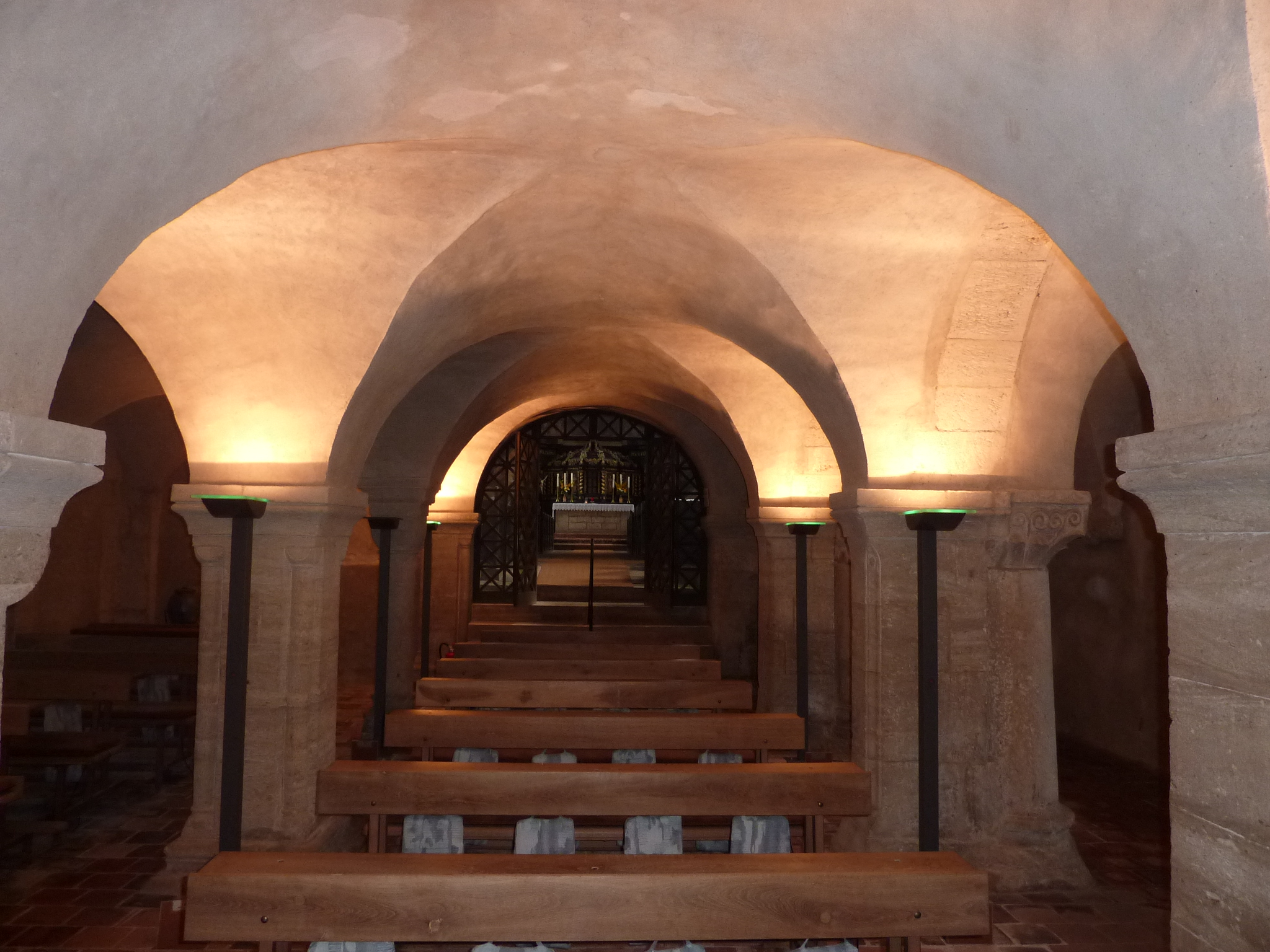 St. Peter und Paul (Hadmersleben)